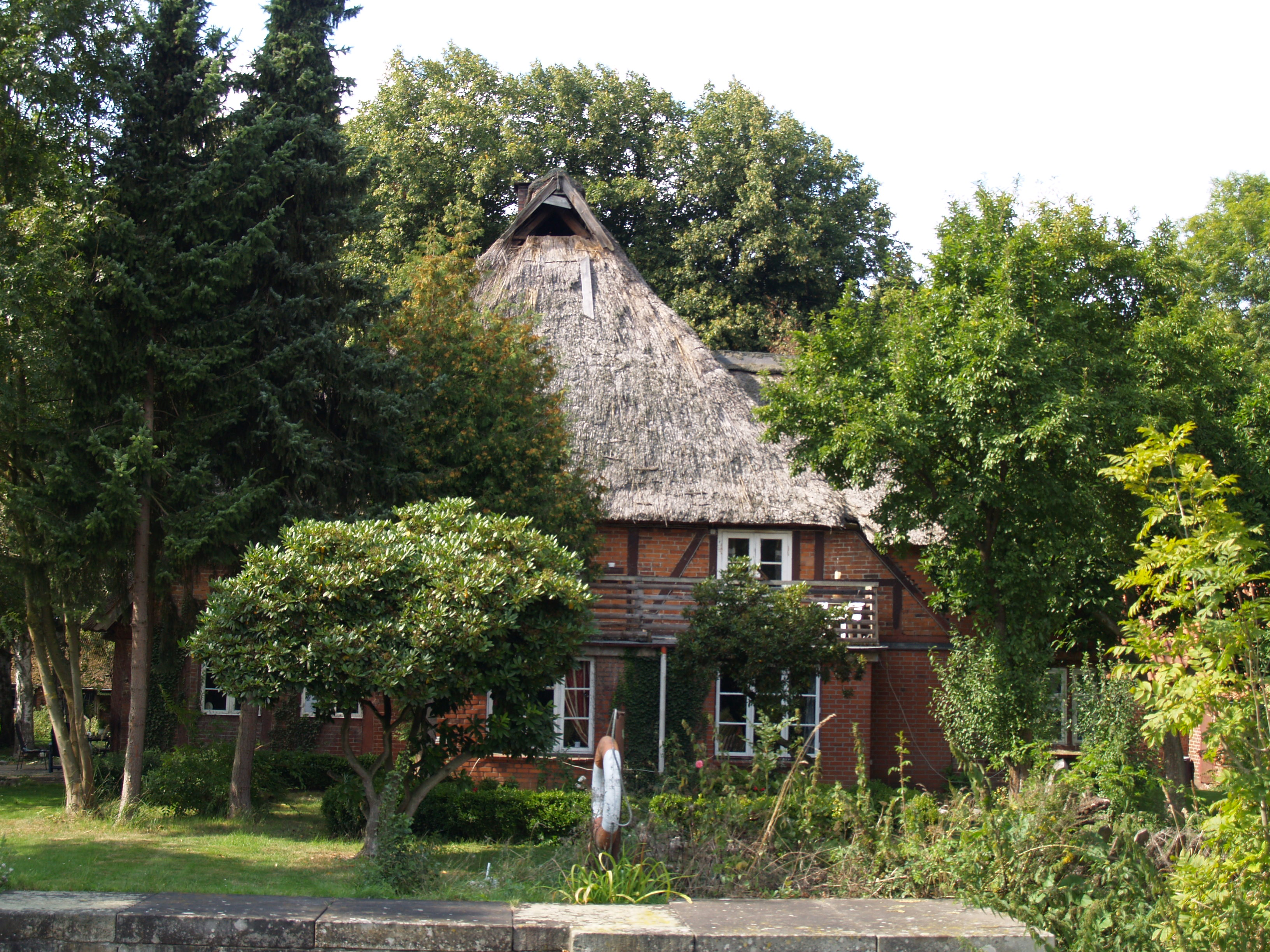 Schleusenmeisterhaus in Witzeeze, Kreis Herzogtum Lauenburg, Deutschland